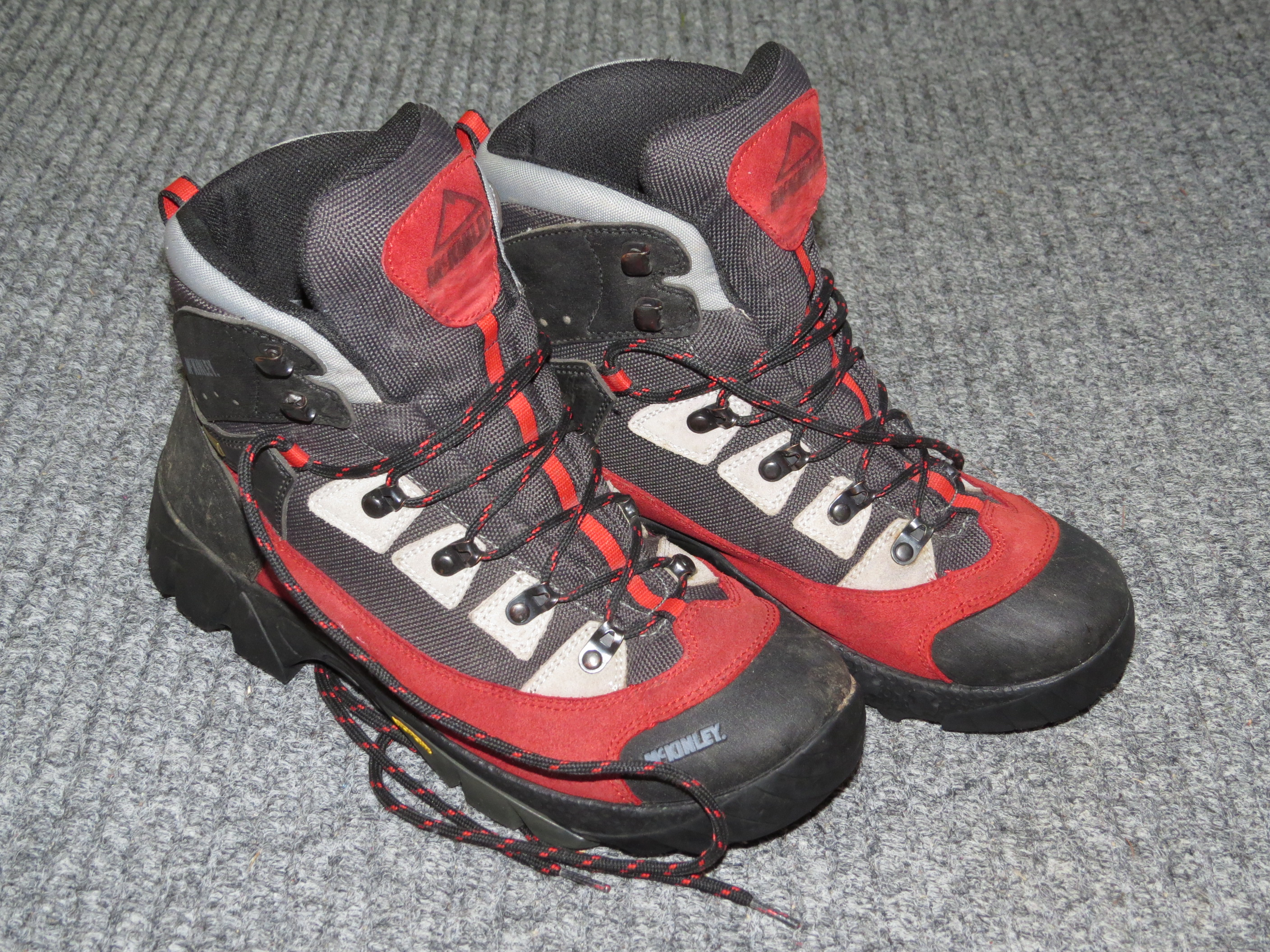 McKinley Hiking boots